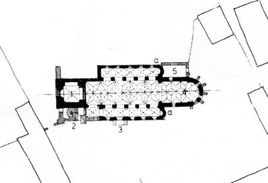 Planul bisericii fortificate de la Șura Mare, Sibiu